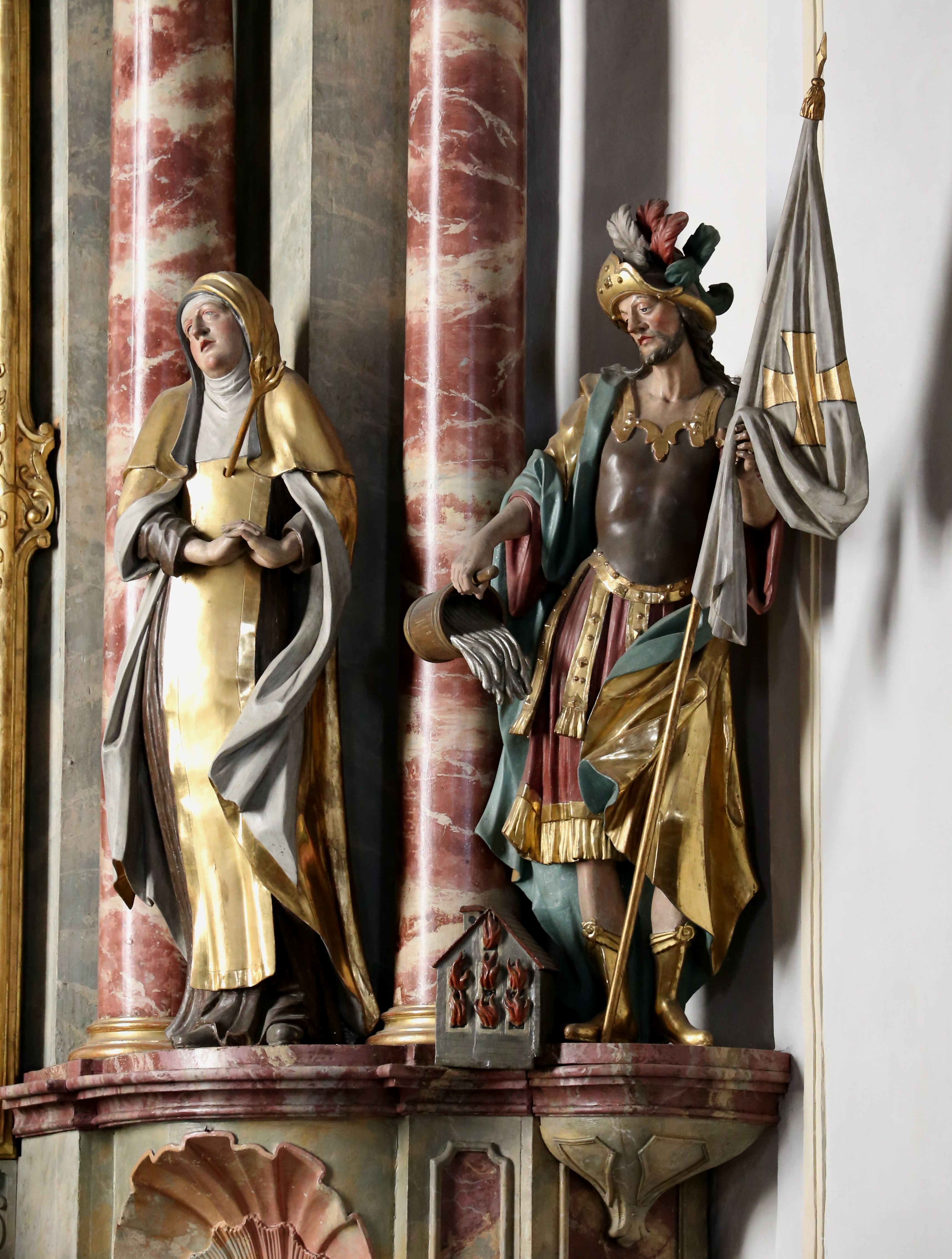 Stadtplatz 101a, Burghausen; Institutskirche, sogenannte Schutzengelkirche, Saalbau von Johann Martin Pöllner, 1731